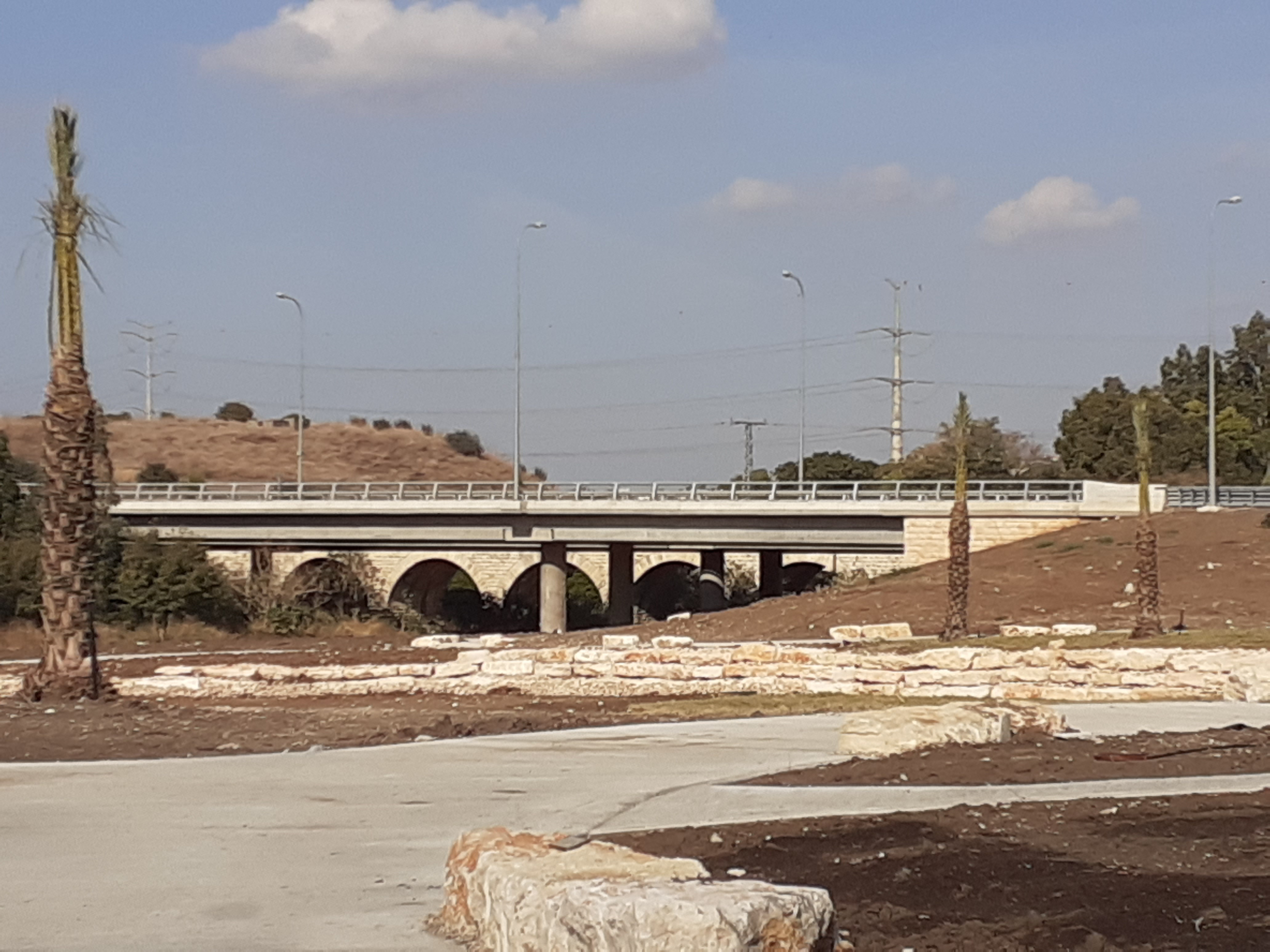 הפארק הנבנה כיום באזור גשרי הקישון ובו שבילי אופניים והולכי רגל ופינות ישיבה